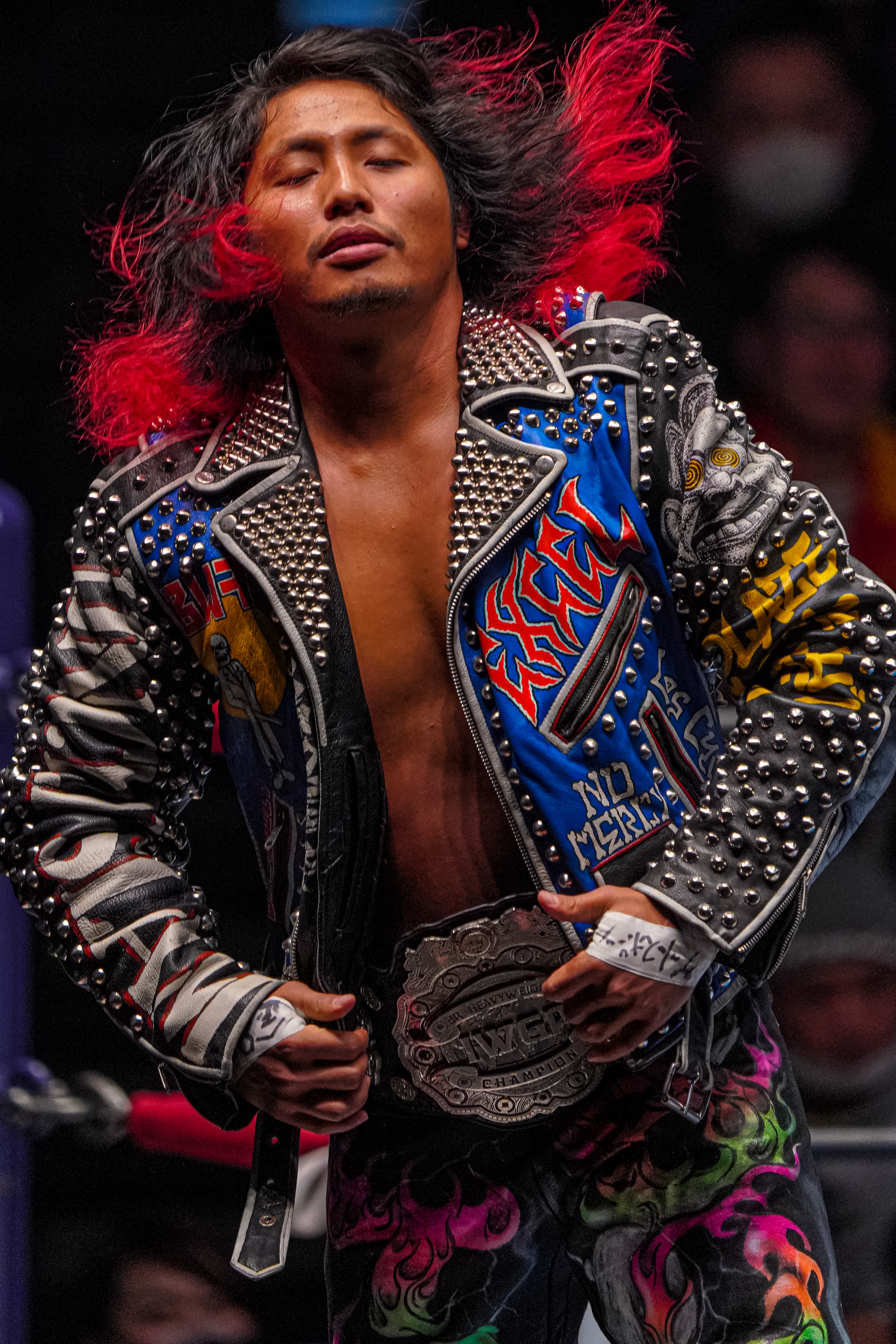 2020.02.19 後楽園ホール